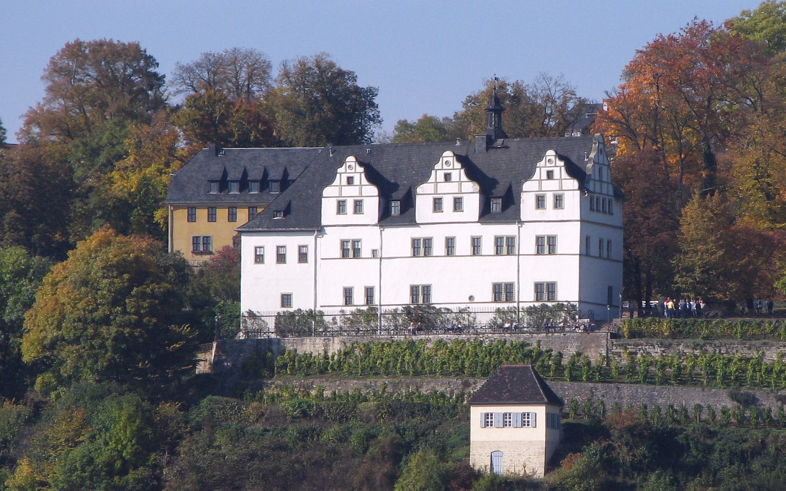 Dornburg an der Saale Dornburger Schlösser Renaissanceschloss Foto 2008 Wolfgang Pehlemann Wiesbaden IMG_0106